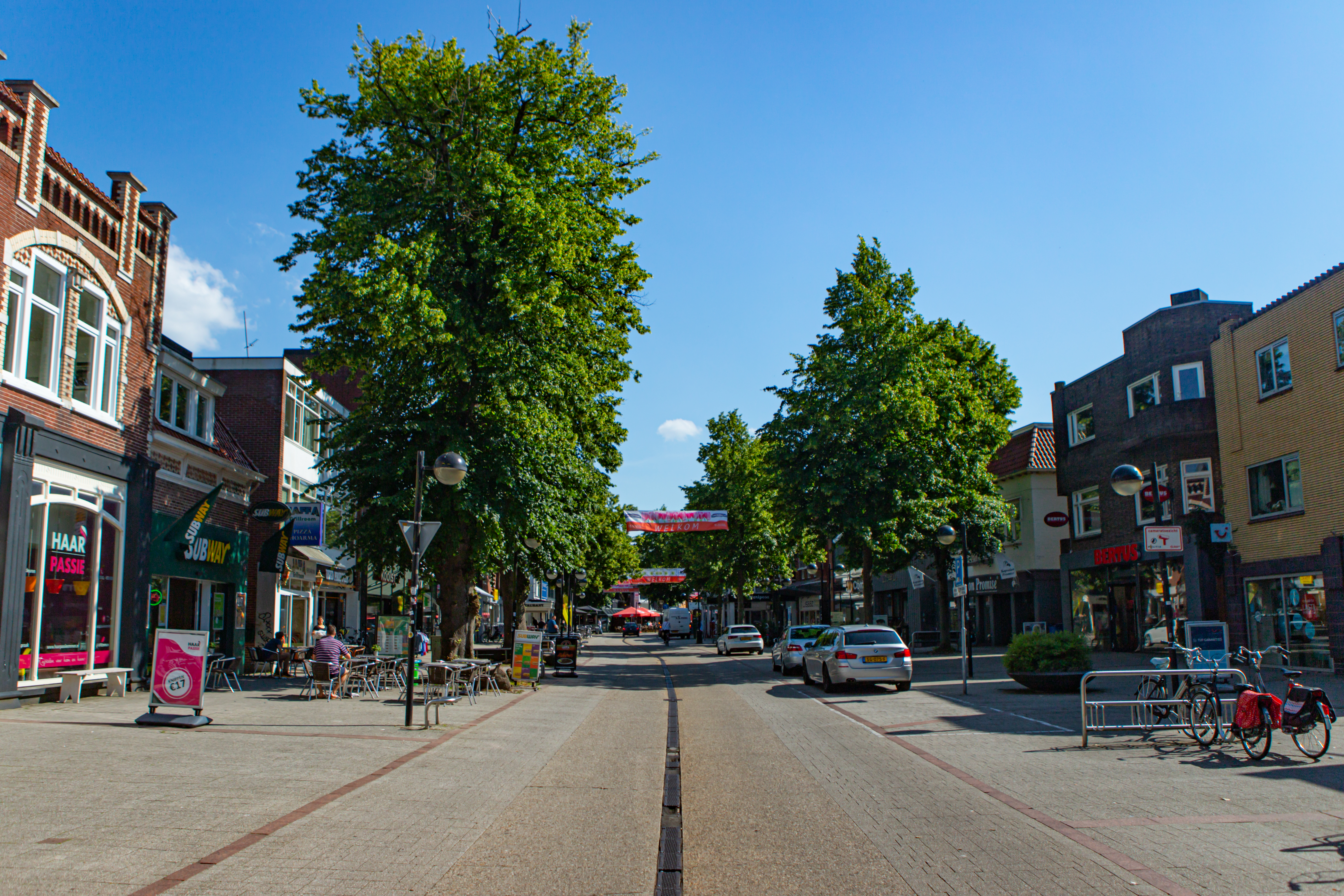 De Hoofdstraat in Emmen in 2019